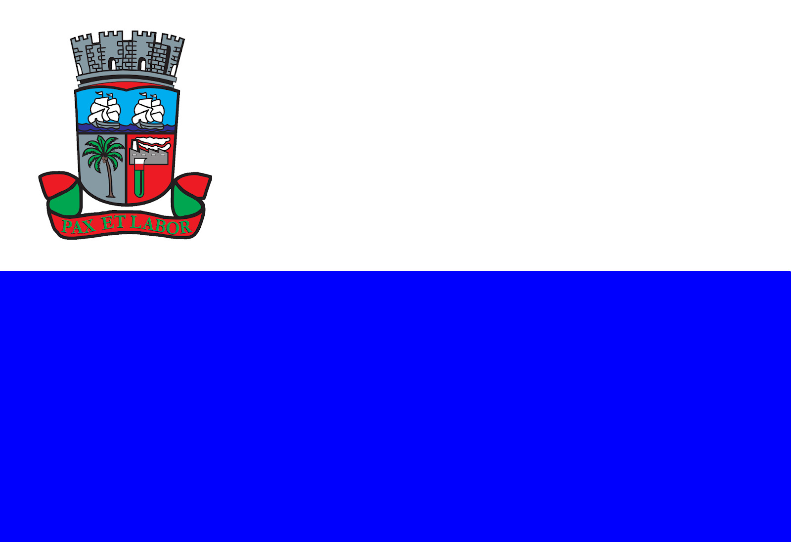 Bandeira do Município de Camaçari na Bahia, Brasil